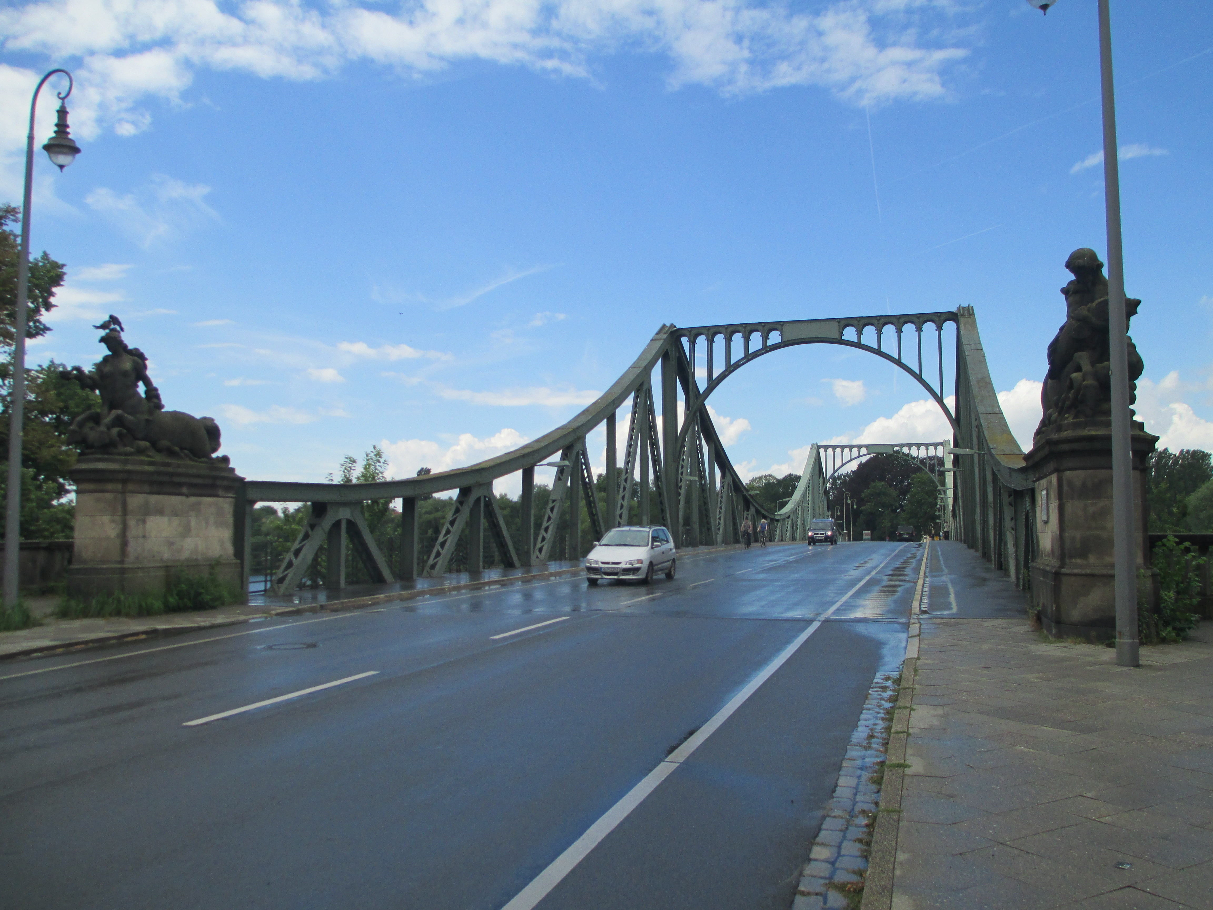 גשר גילינקה בברלין